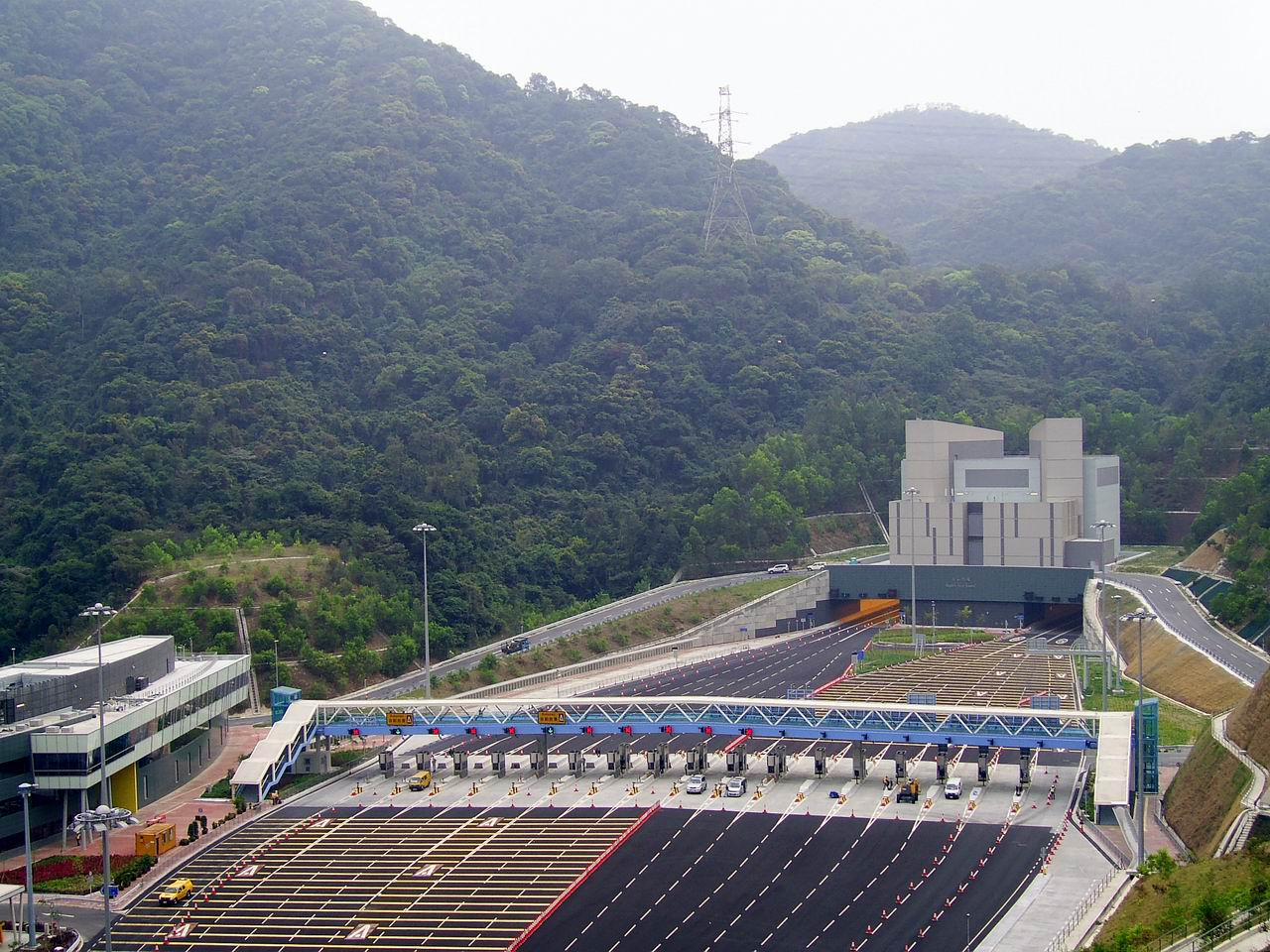 尖山隧道沙田收費廣場及隧道入口